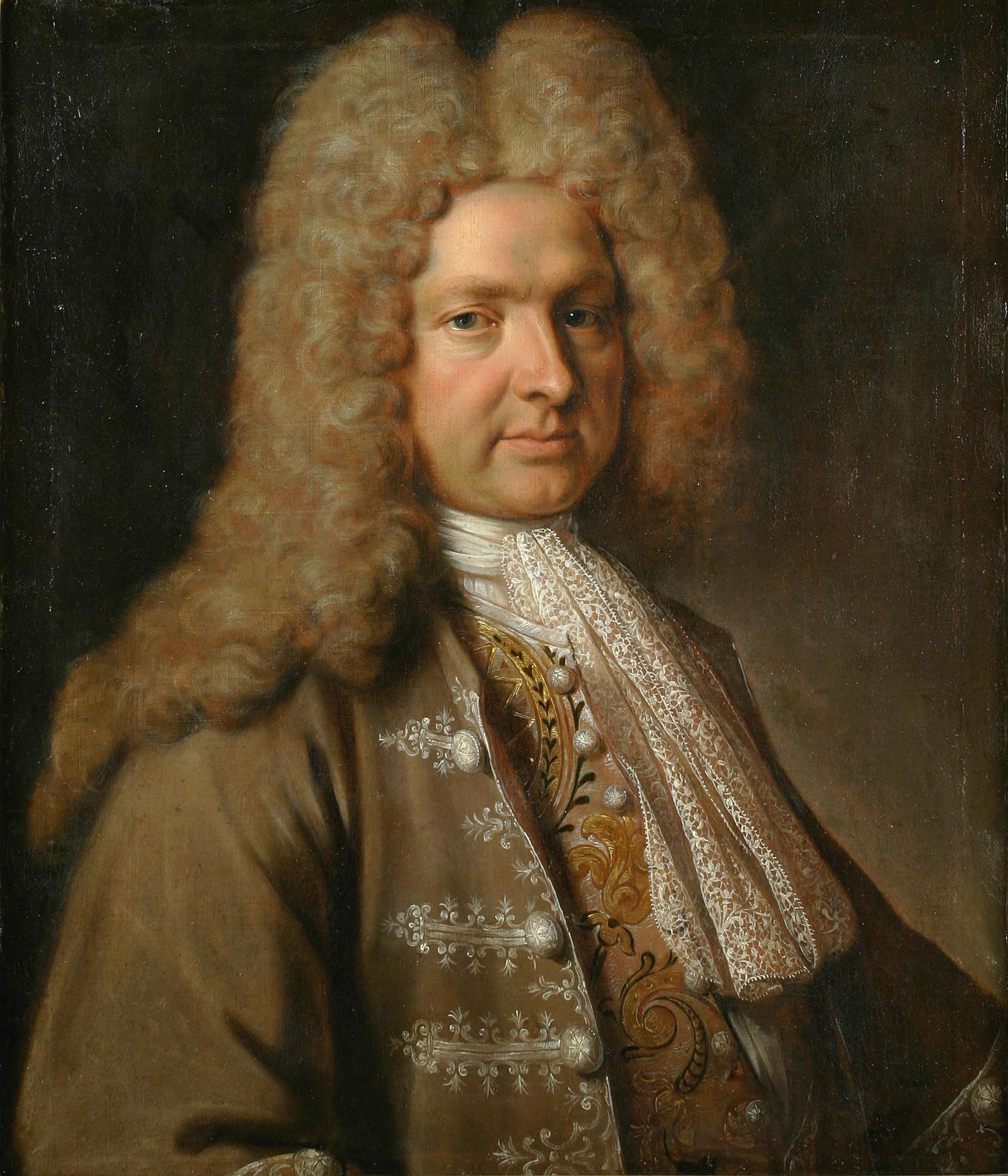 Philippe Néricault Destouches (1680-1754)